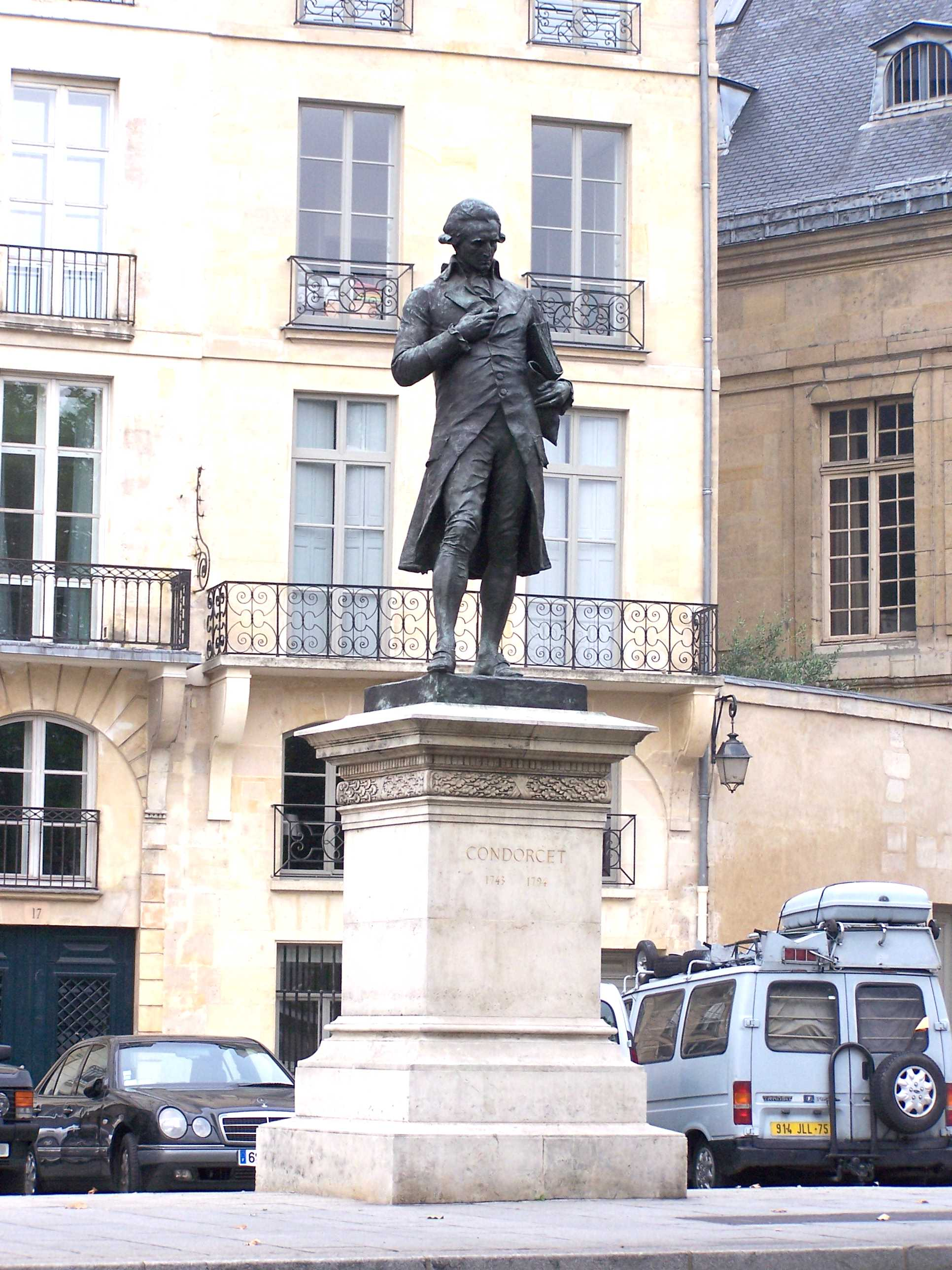 Jacques Perrin (français, 1847-1915: Condorcet (1894/1991), statue de bronze, Quai Conti, VIe arrondissement, Paris, France. Une première statue, élevée le 14 juillet 1894, à l'occasion du bicentenaire de la mort de Condorcet, a été détruite en 1943, un second tirage a été installé à son ancien emplacement en 1991 dans le cadre des célébrations du bicentenaire de la Révolution française.